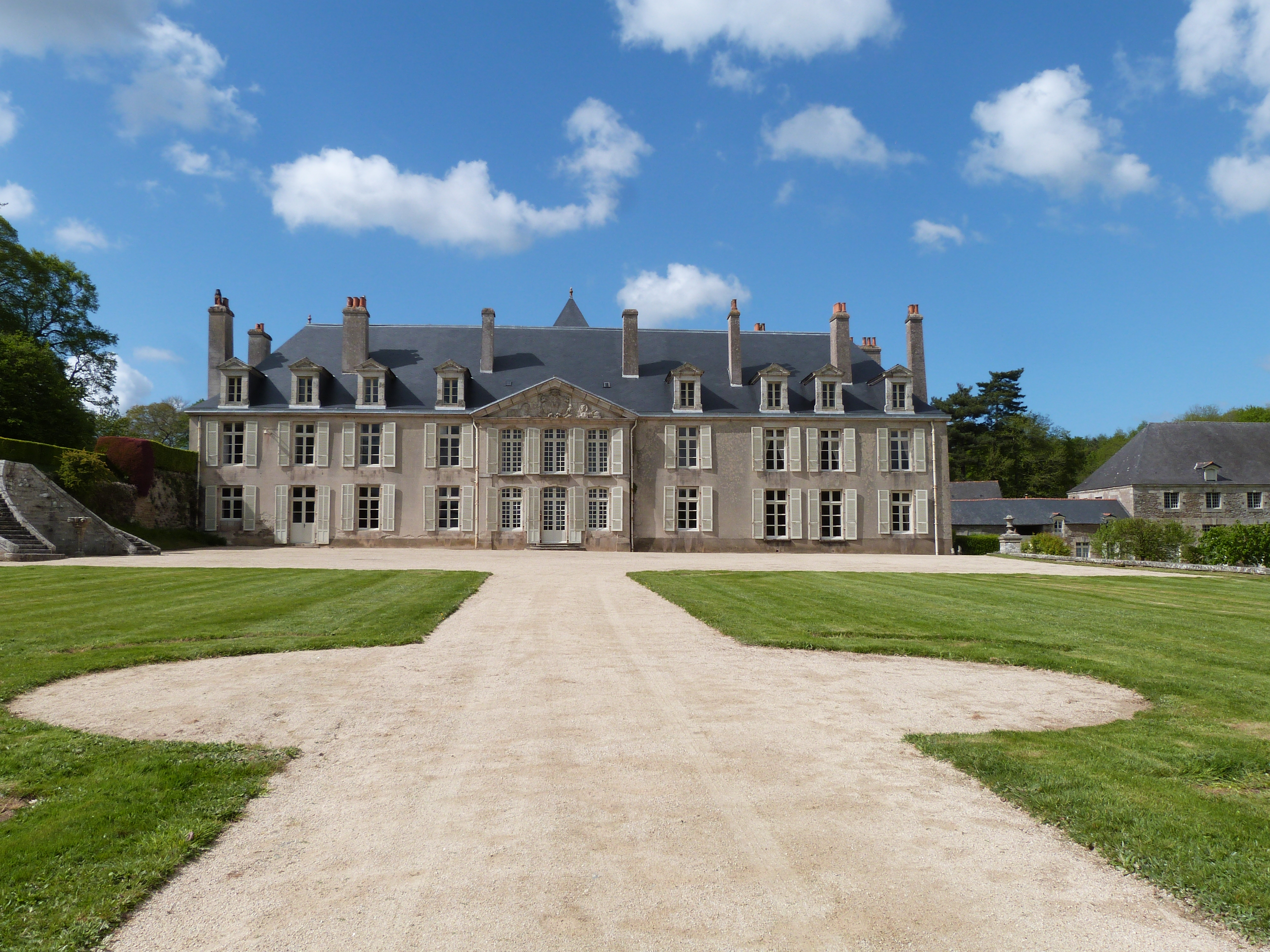 Le château de Catuélan et sa cour d'honneur (Hénon, Côtes-d'Armor)